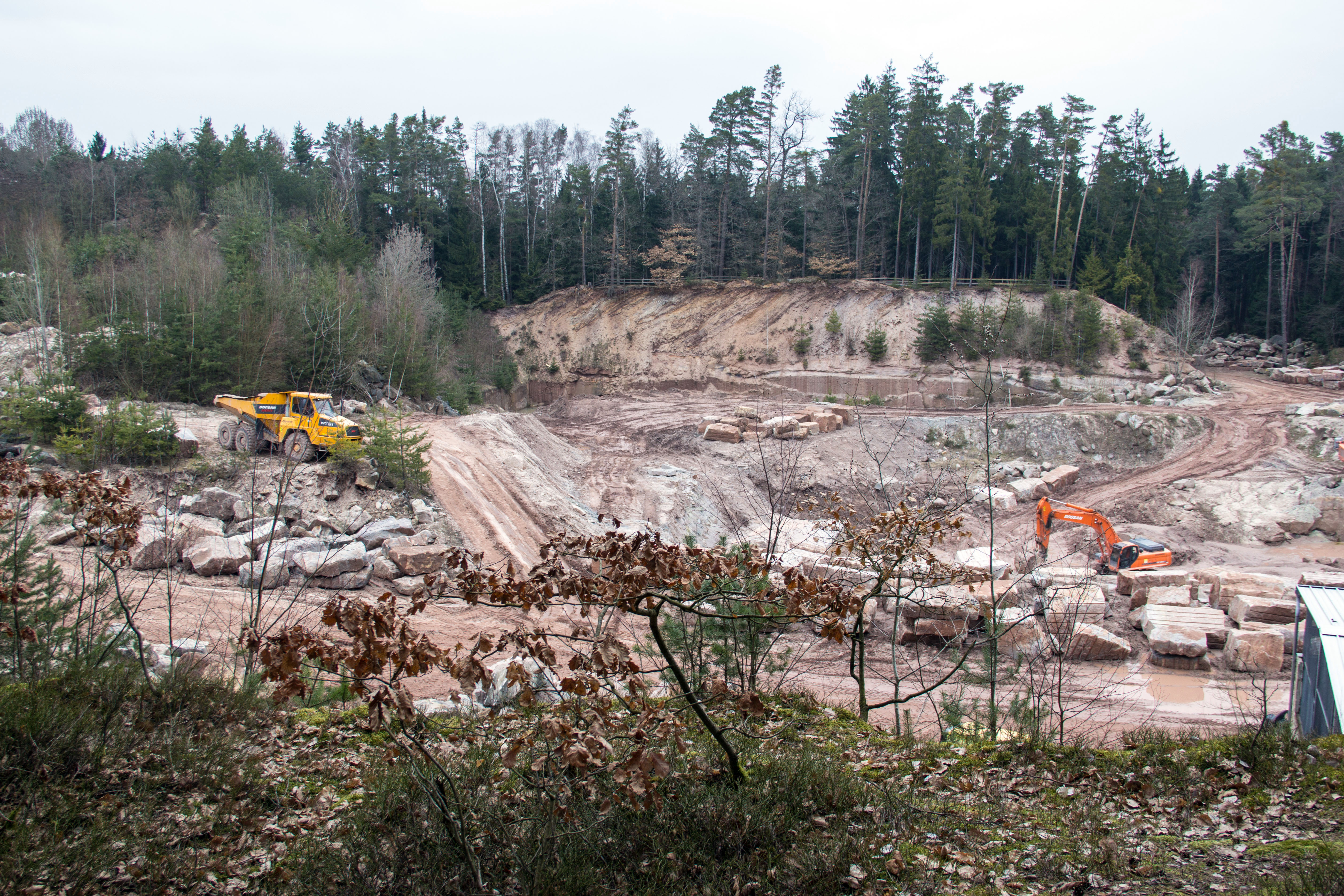 Steinbruch in Worzeldorf